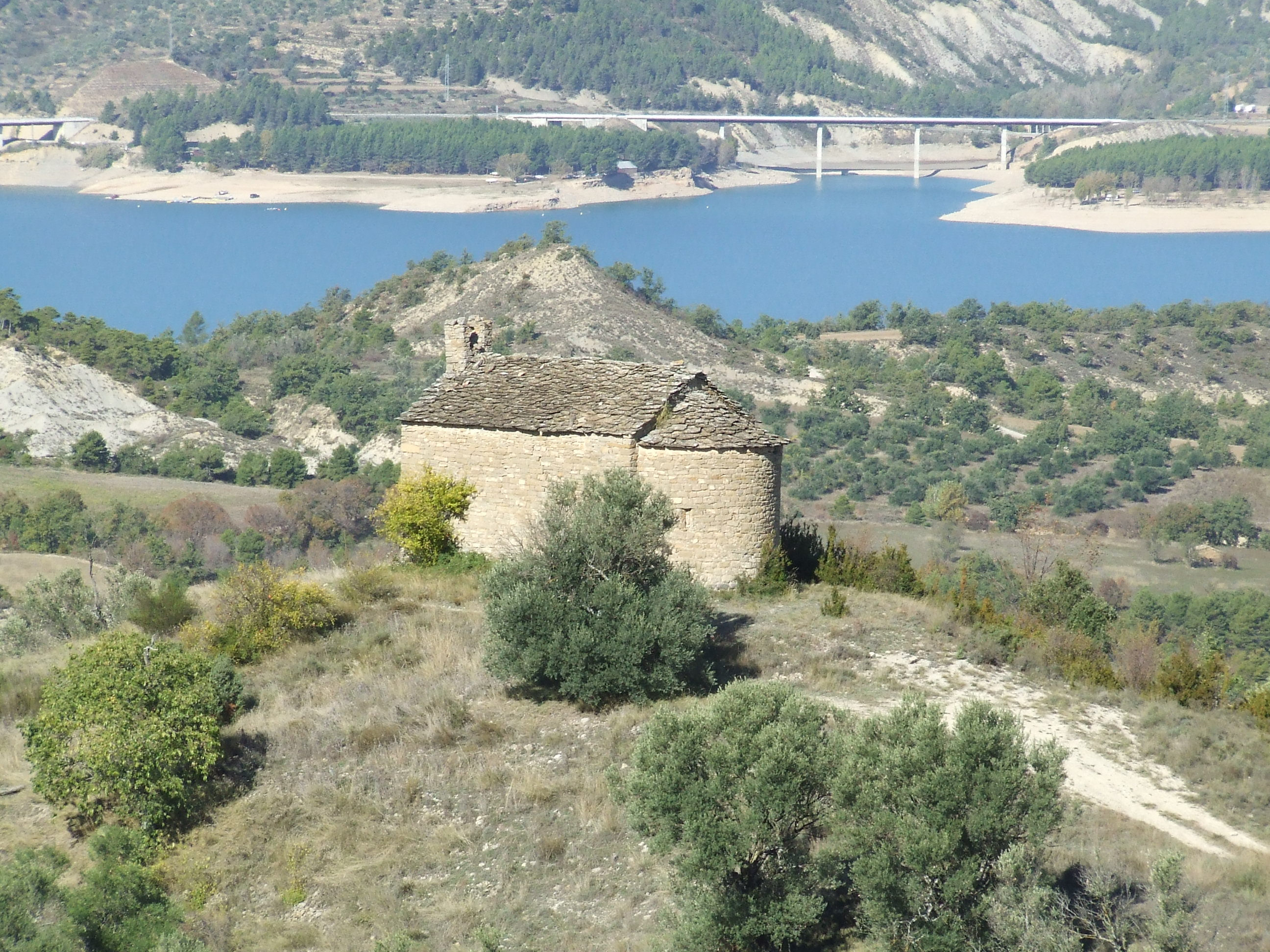 Església de Sant Serni de Montesquiu (Orcau, Isona i Conca Dellà, Pallars Jussà)